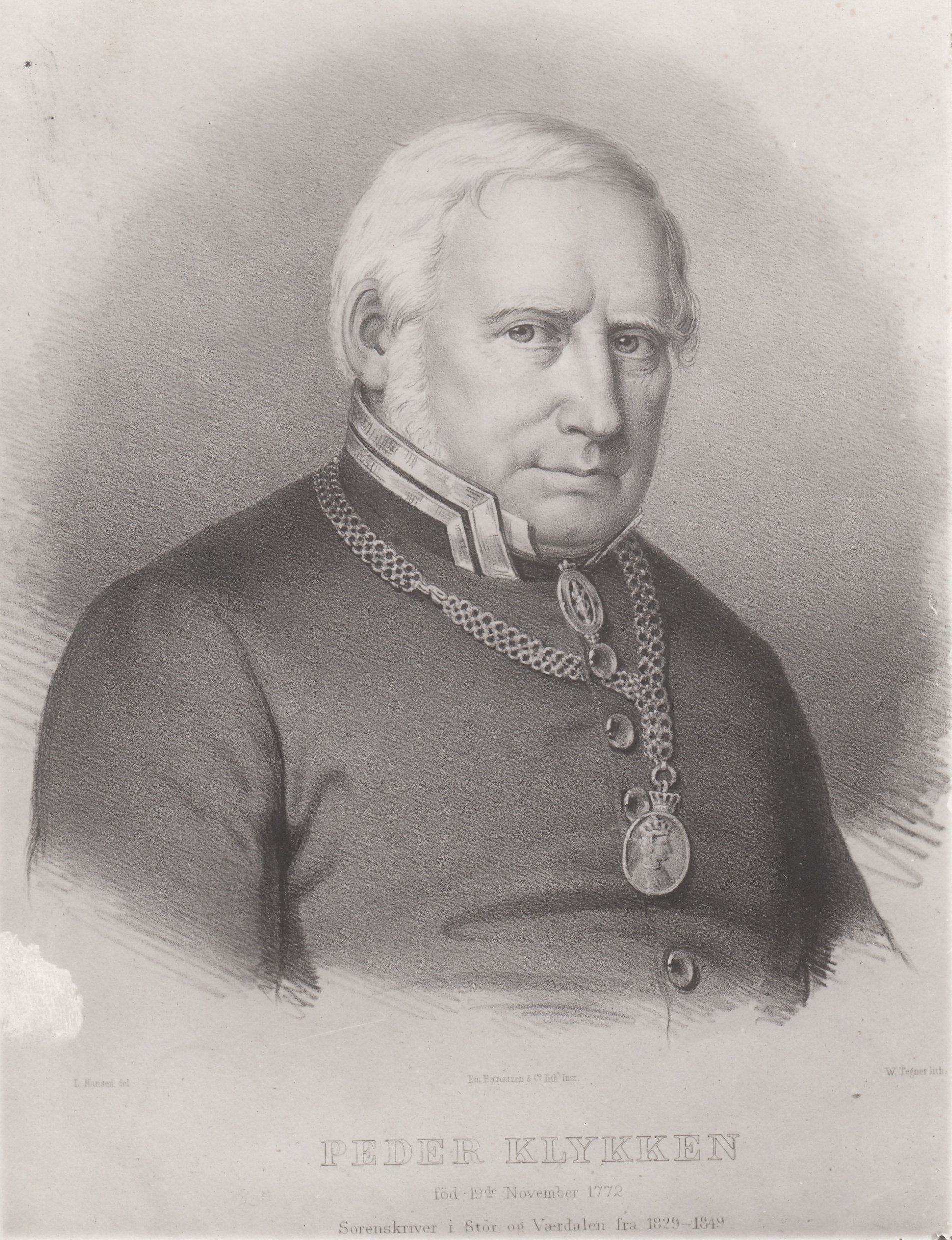 Format: Fotopositiv Dato / Date: Ukjent Fotograf / Photographer: Ukjent Wikipedia: Peder Klykken (1772 - 1861) Eier / Owner Institution: Trondheim byarkiv, The Municipal Archives of Trondheim Arkivreferanse / Archive reference: Tor.H41.B40.F2949 Merknad: Peder Klykken (19 november 1772 - 22 januar 1861) var en norsk politiker og sorenskriver. Han var født i Overhalla, og ble sorenskriver i Lofoten mai 1809. Valgt inn på Stortinget i 1818 for Nordlands Amt. I 1819 forlot han Lofoten, og ble sorenskriver i Stjørdal og Verdal fra 1829-1849. Han var stortingsmann mellom 1821-1823, og en siste gang i 1827, og representerte begge gangene nordre Trondhjems Amt.